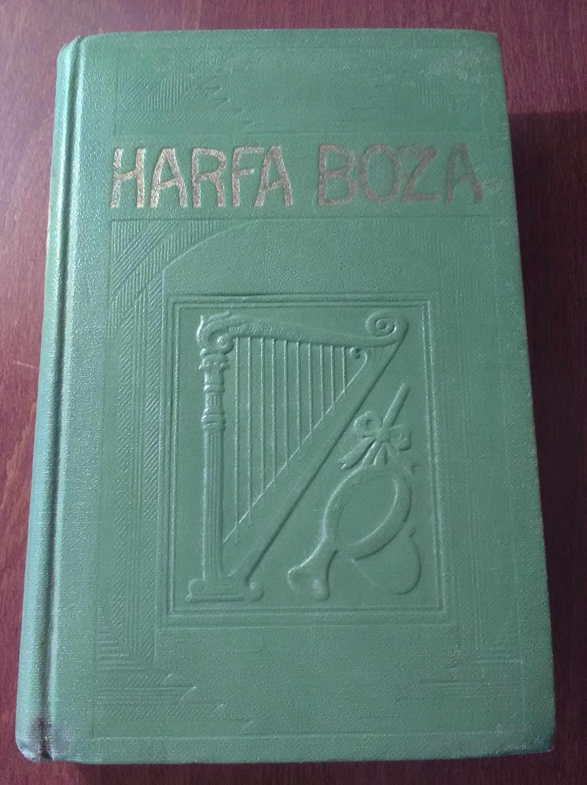 Harfa Boża. Książka wydana przez Towarzystwo Strażnica w 1921. Edycja polska na zdjęciu jest z 1930 roku.